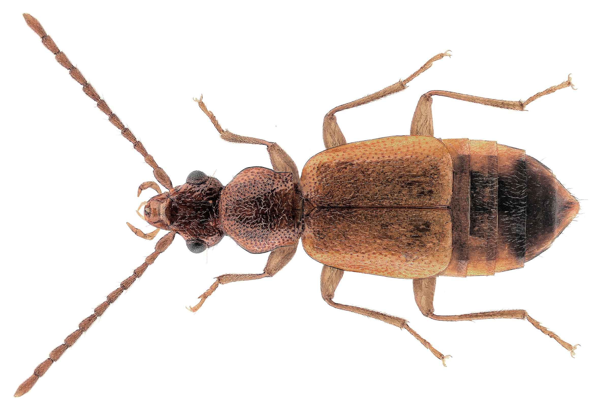 Familie: Staphylinidae Grösse: 4,5-5,5 mm Verbreitung: Europa Ökologie: montan auf Blüten in Gewässernähe Fundort: Germania, Oberfranken, Selbitz leg.det. U.Schmidt, 2003 Foto: U.Schmidt, 2006